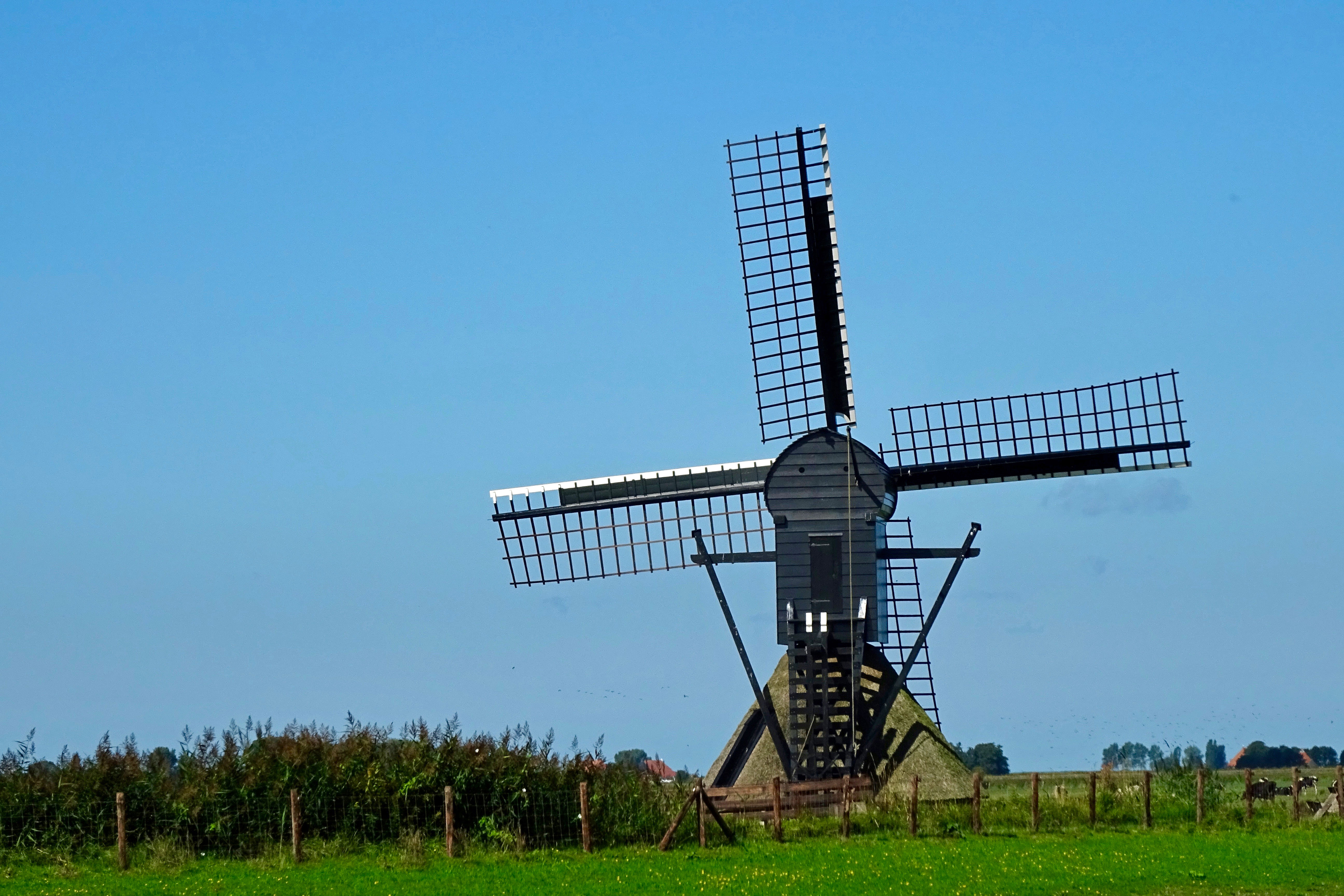 Nijhuizumer molen